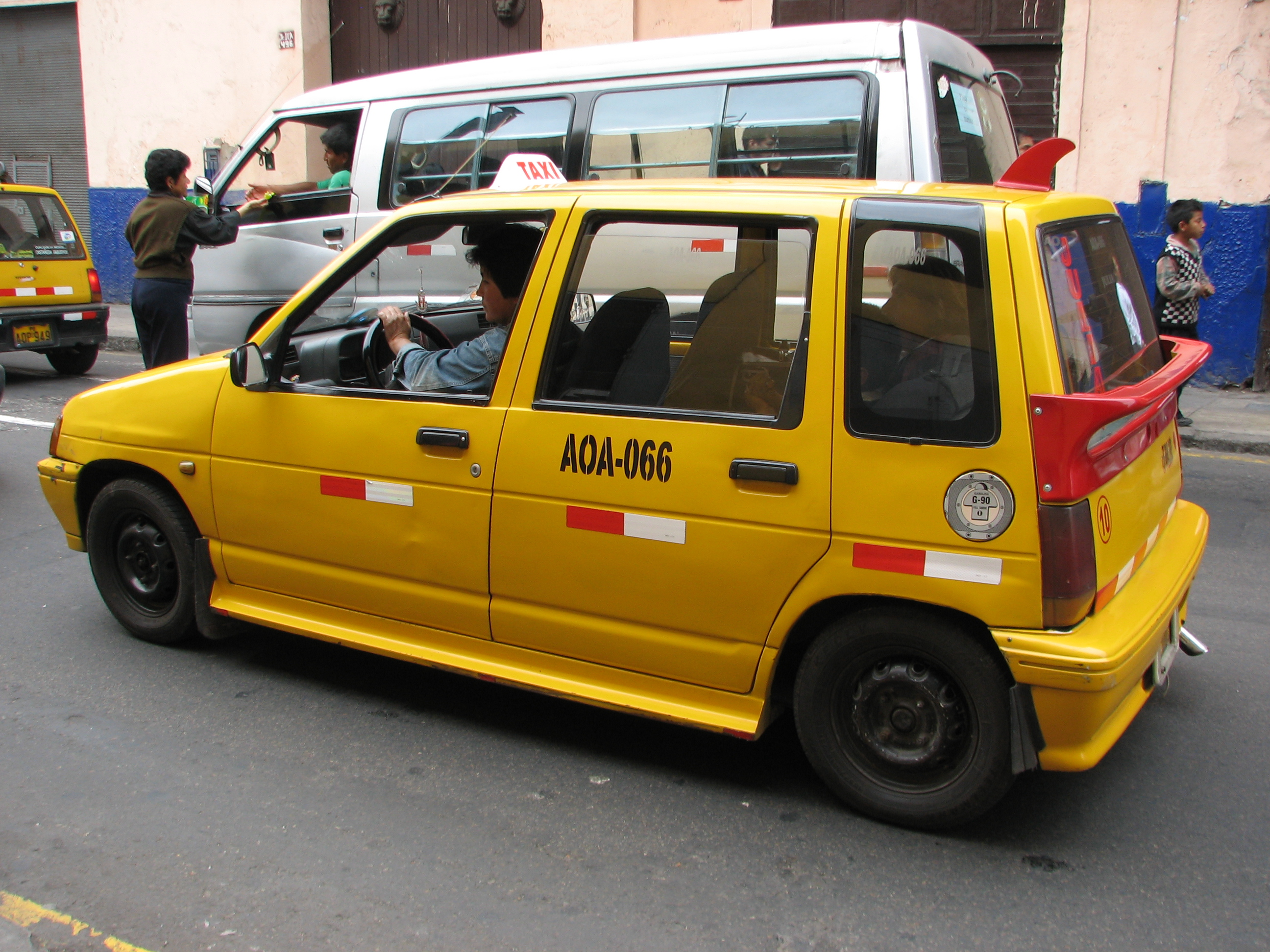 Taxi (yellow) in Lima/Lima, Peru.